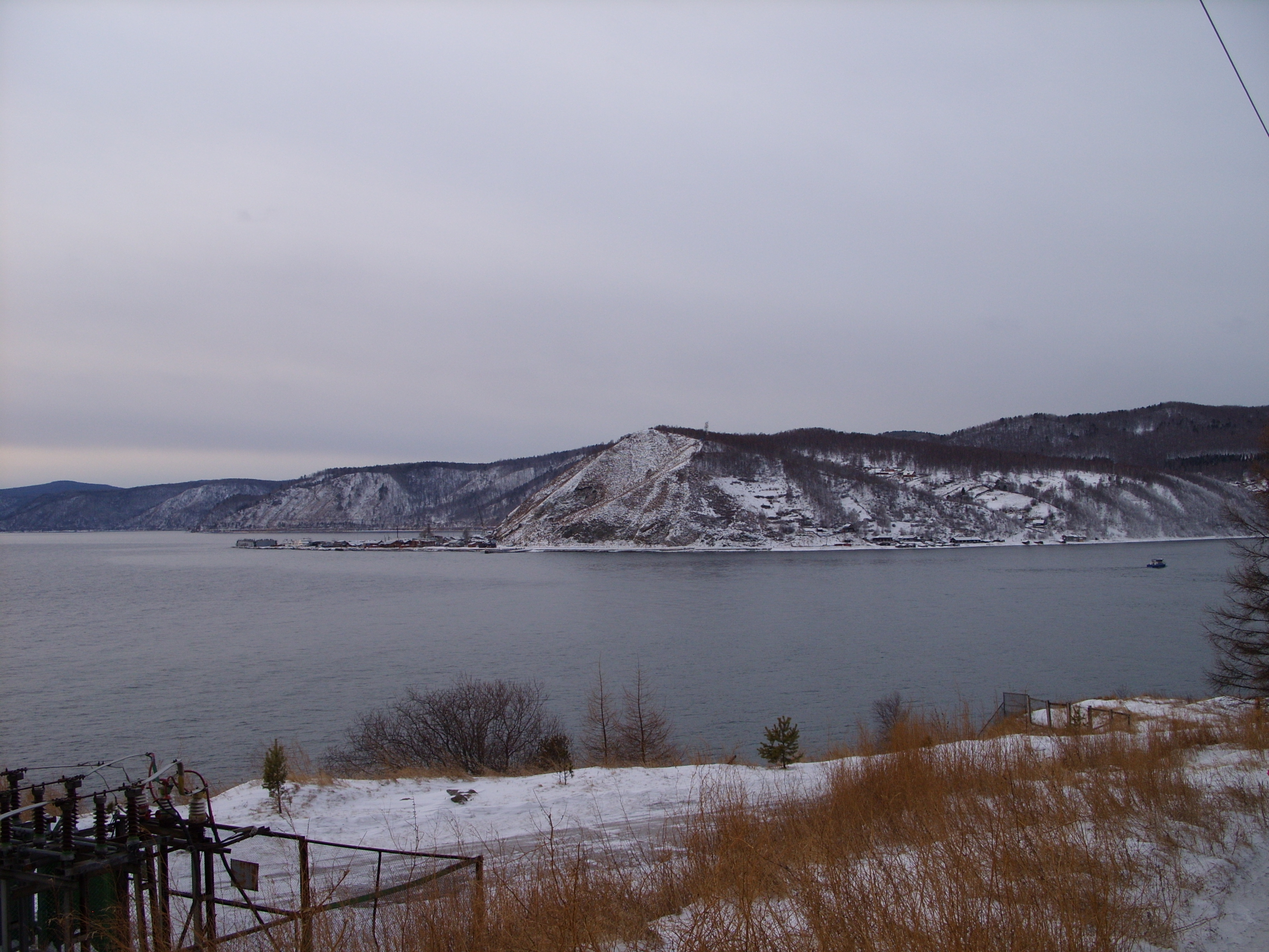 с противоположного, листвянского берега